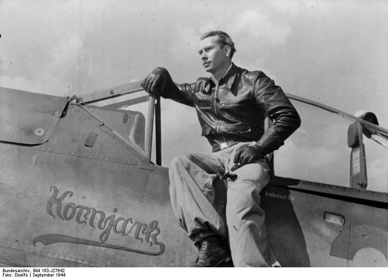 Er vernichtete vierzehn "Viermotorige" Der Luftkrieg der letzten Wochen wird vor allem durch die mit sämtlichen Mitteln gesteigerte Offensive des Feindes vom Westen und Süden gegen das Reichsgebiet gekennzeichnet. Sie Stellen an unsere Abwehr, insbesondere an unsere Jäger, die höchsten Anforderungen. Hier einer unserer erfolgreichen Jäger, Feldwebel Konrad Bauer. Er bezwang bisher 36 feindliche Flugzeuge, unter ihnen 14 "Viermotorige". PK-Aufnahme-Kriegsberichter Doelfs 18.9.44 (Herausgabedatum!)